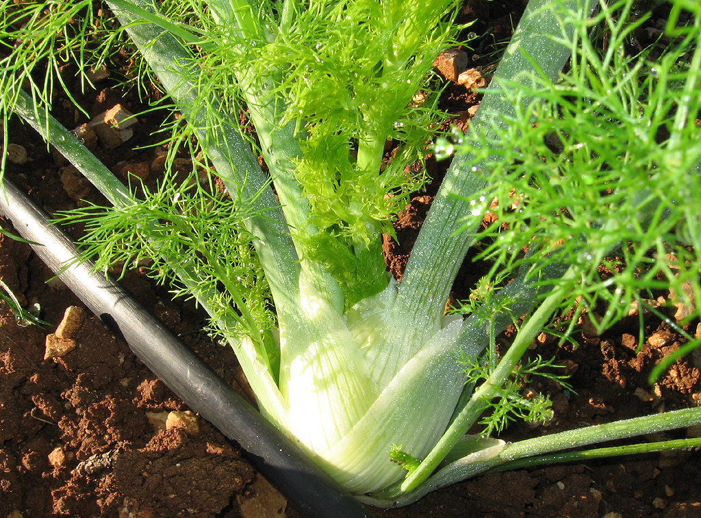 Foto del Finocchio di Mezzapesa (BA) Autore: Paolo Ciarlantini